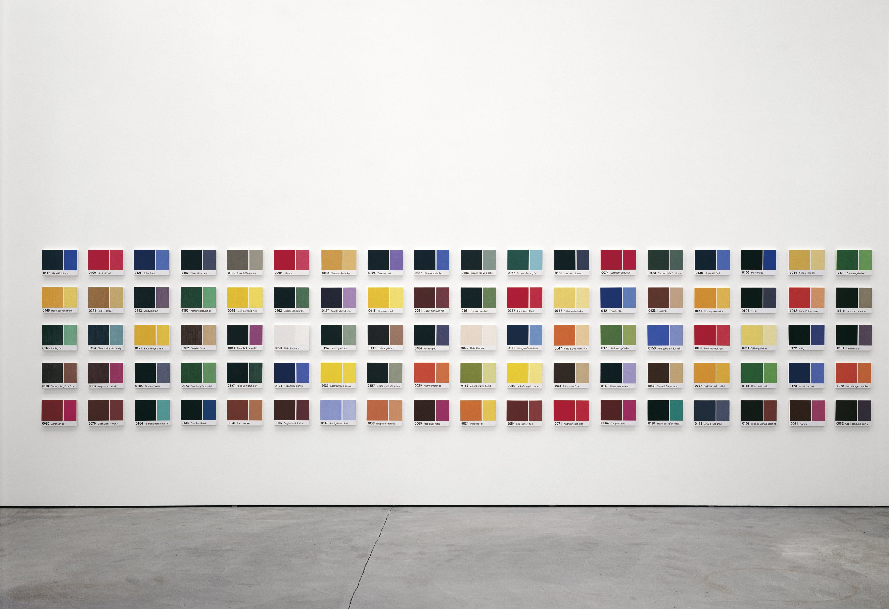 Bildbeispiel